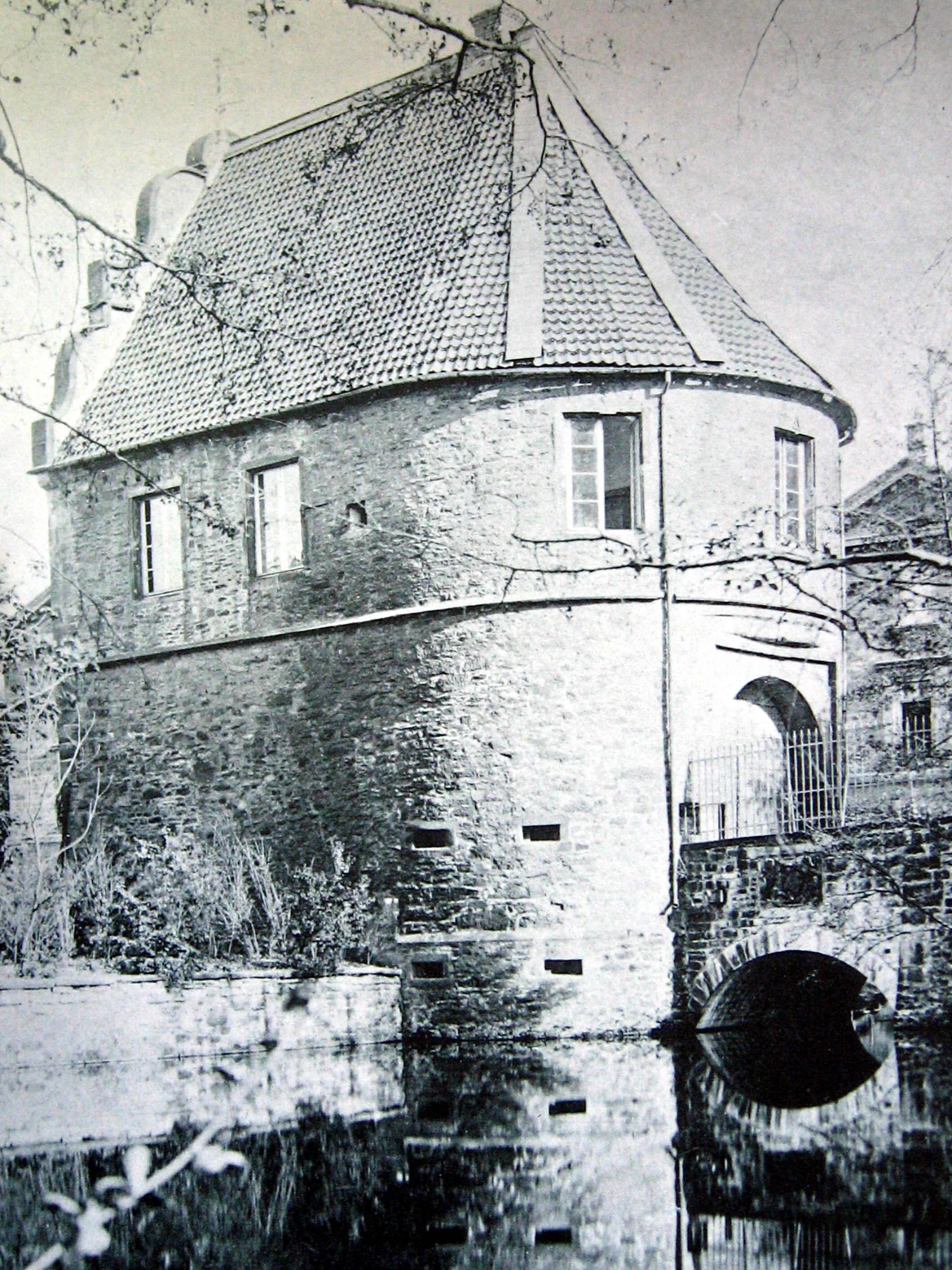 Dortmund, Rittergut Romberg, Torhaus